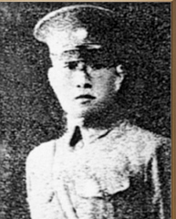 方叔洪 A KMT general.